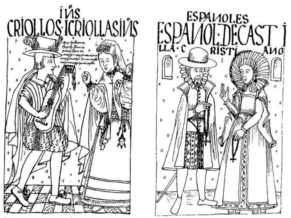 Los españoles y sus descendientes nacidos en América conformaban el alto grupo social en la colonia, Dibujo de la crónica Peruana de Huamán Pama de Ayala, siglo XVI.